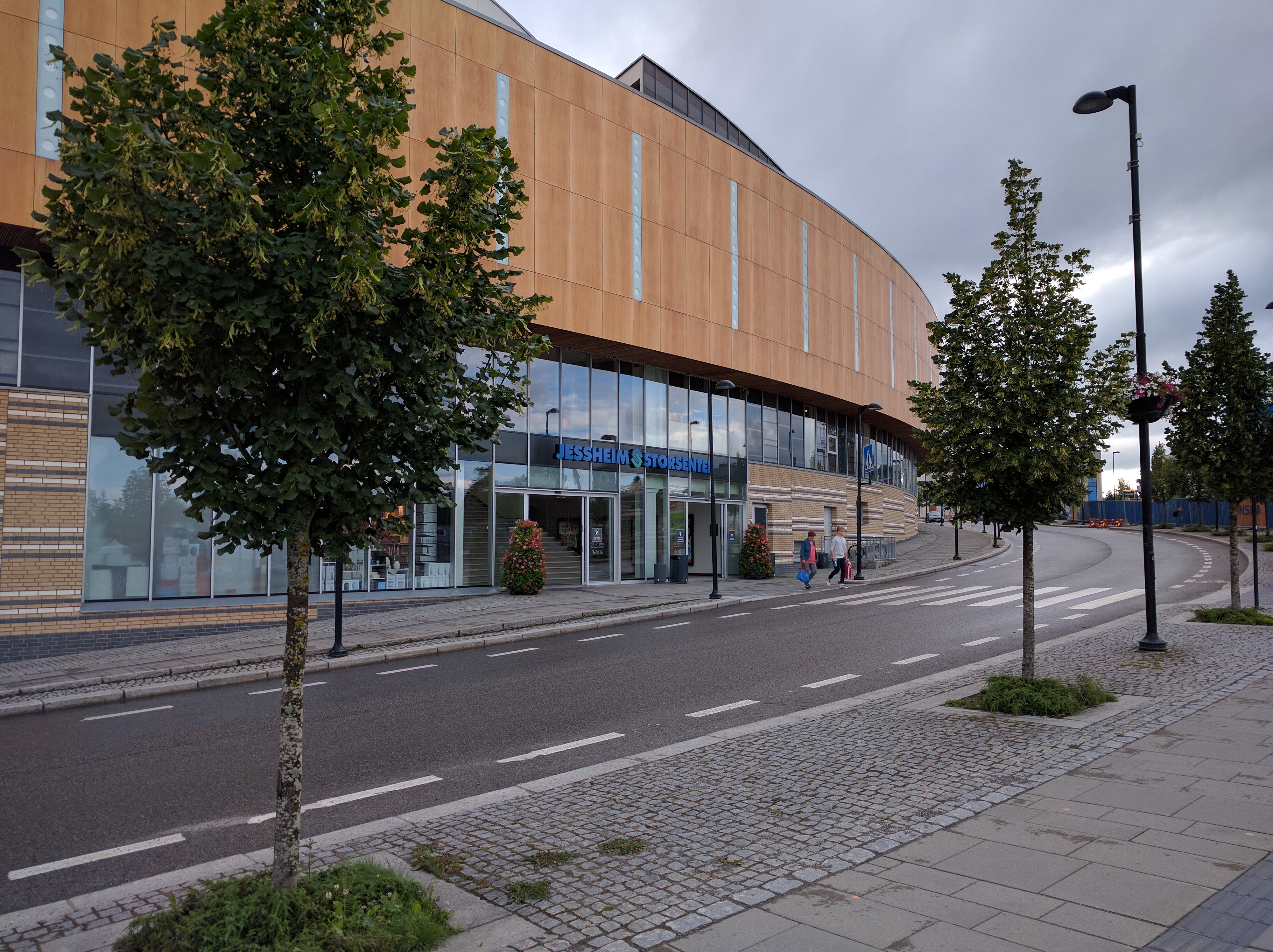 Fasaden på kjøpesenteret Jessheim storsenter